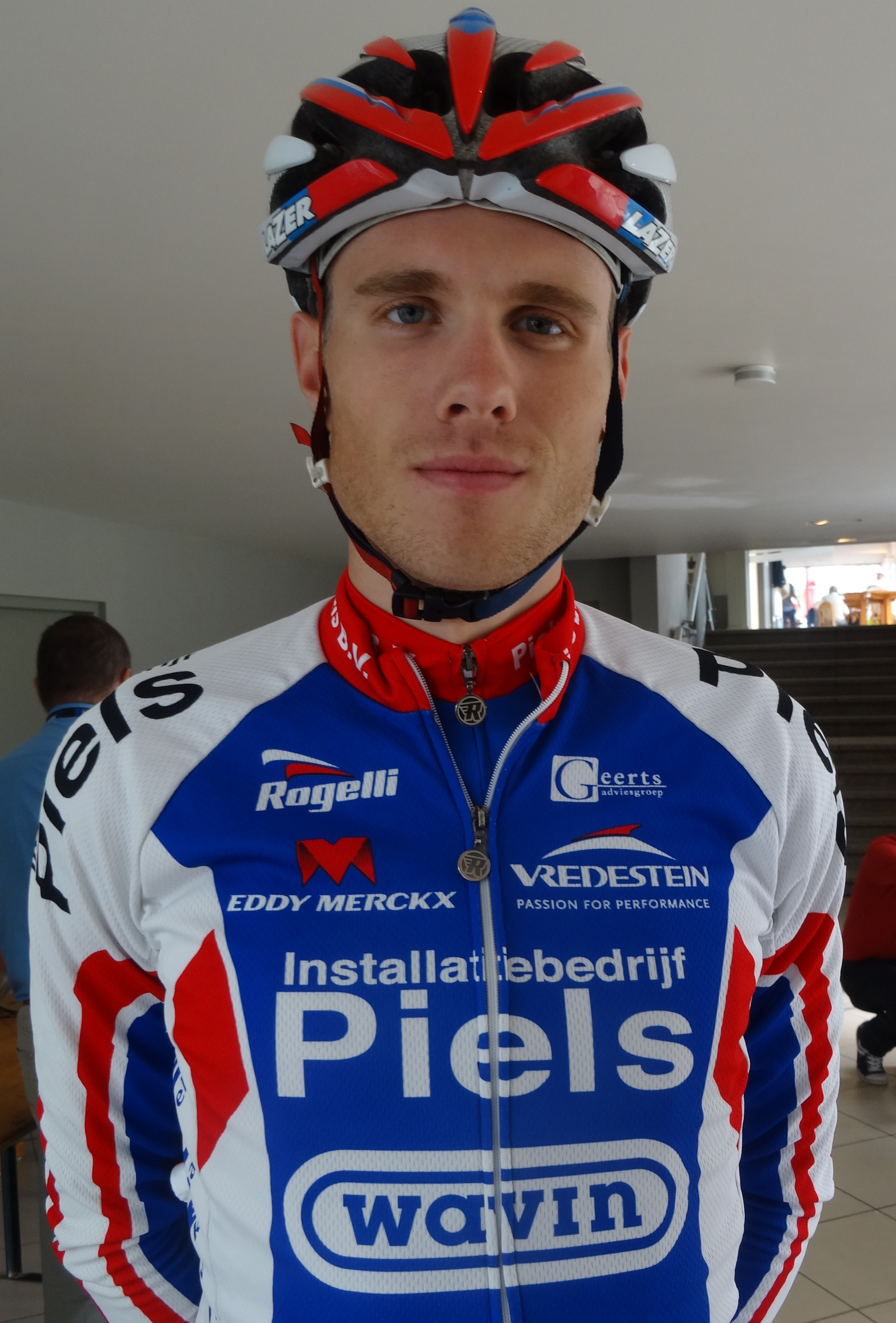 Reportage photographique réalisé le samedi 13 septembre à l'occasion du départ et de l'arrivée de la Flèche côtière 2014 à Heist (Knokke-Heist), Belgique.